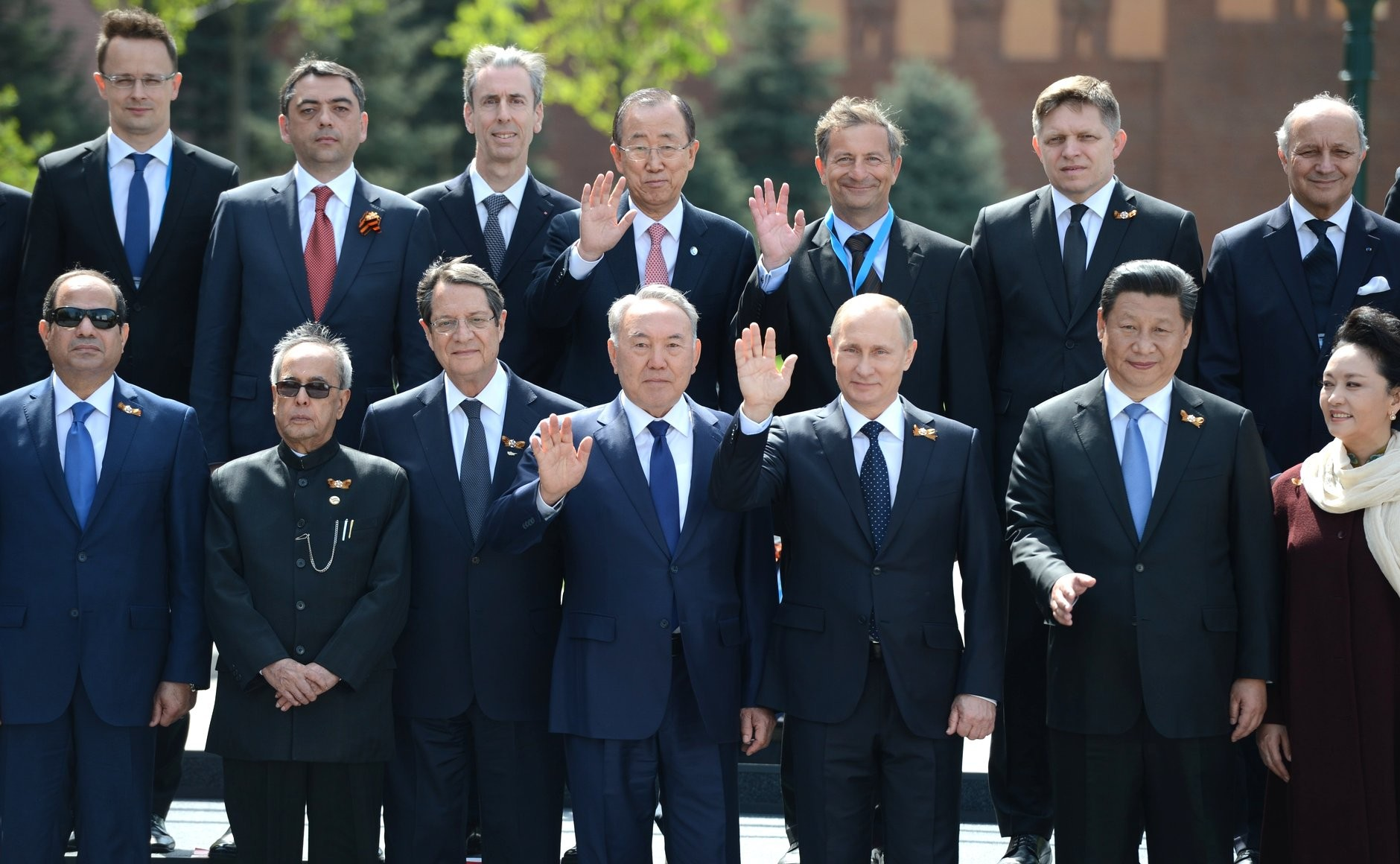 С главами иностранных государств и правительств, прибывшими в Москву на празднование 70-летия Победы.